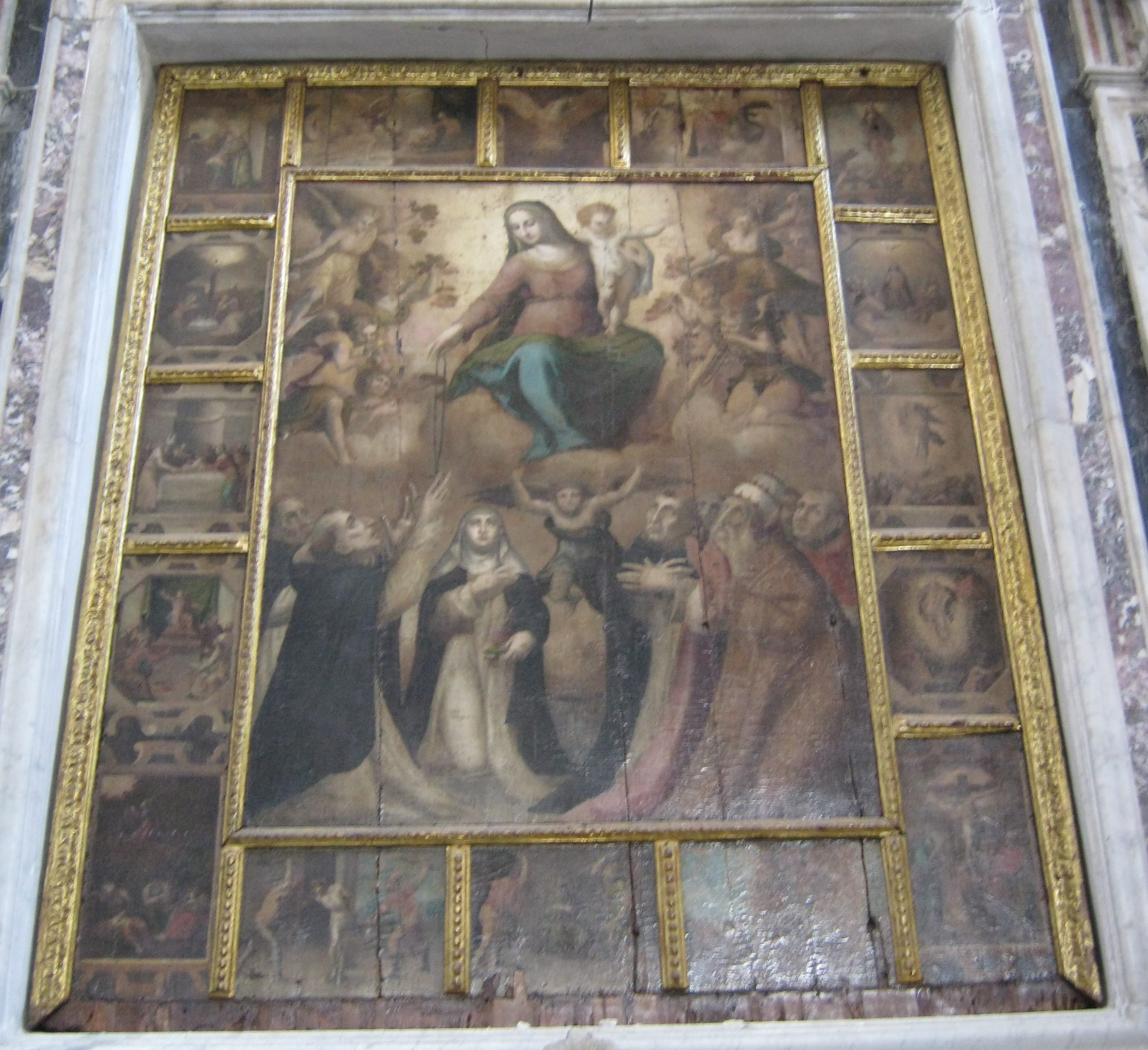 Santa Maria del Rosario, Deodato Guinaccia, CHiesa del Rosario, Santa Lucia del Mela, Messina, Sicilia